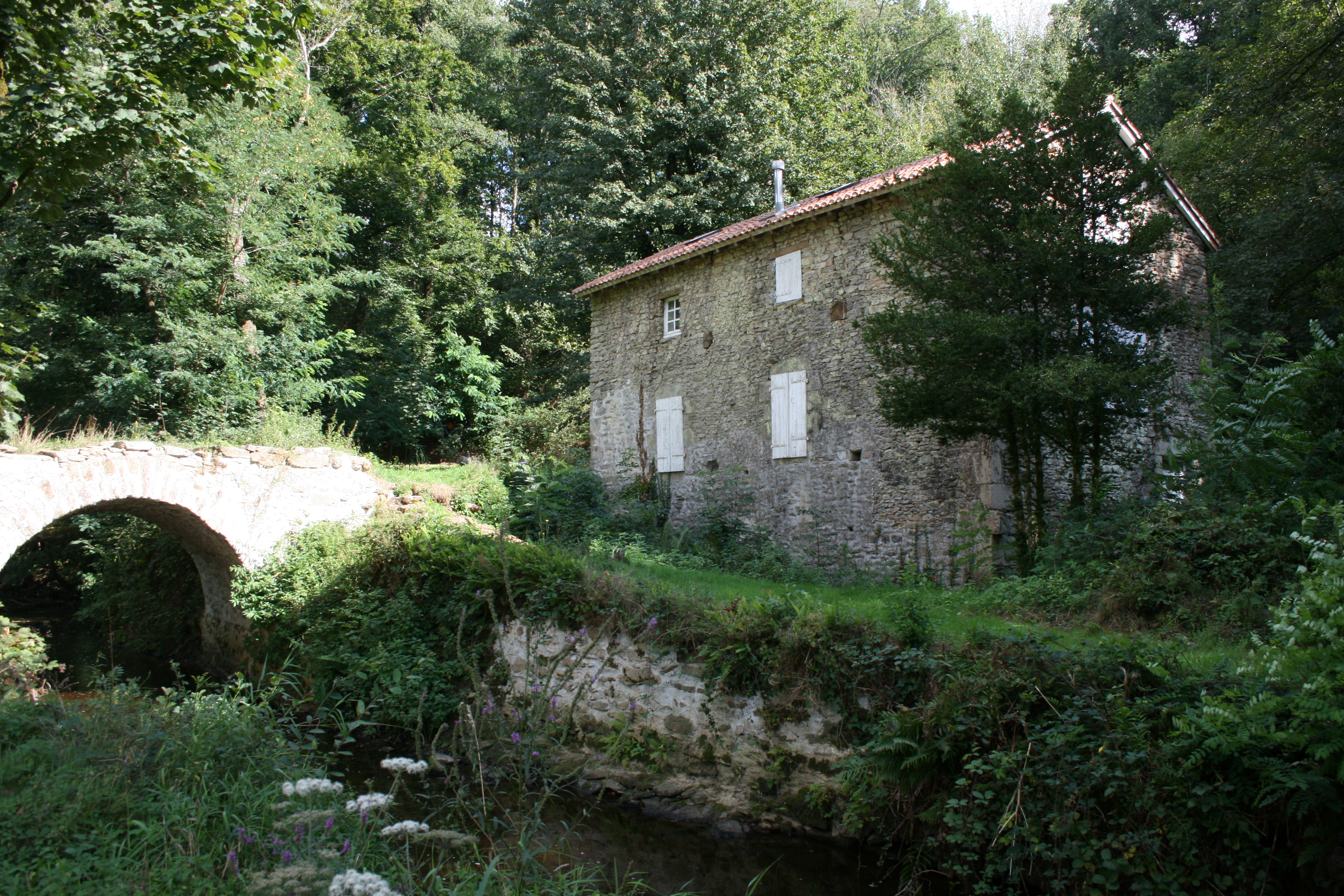 Au bord de la Brame. A fonctionné entre 1750 et 1943,environ.